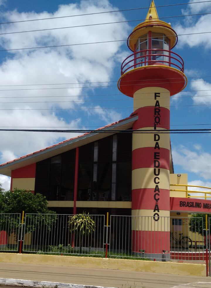 Vista da Biblioteca Pública Farol da Educação Brasilino Miranda, em Bacabal, no Maranhão, Brasil.Foi um programado governo Roseana Sarney.